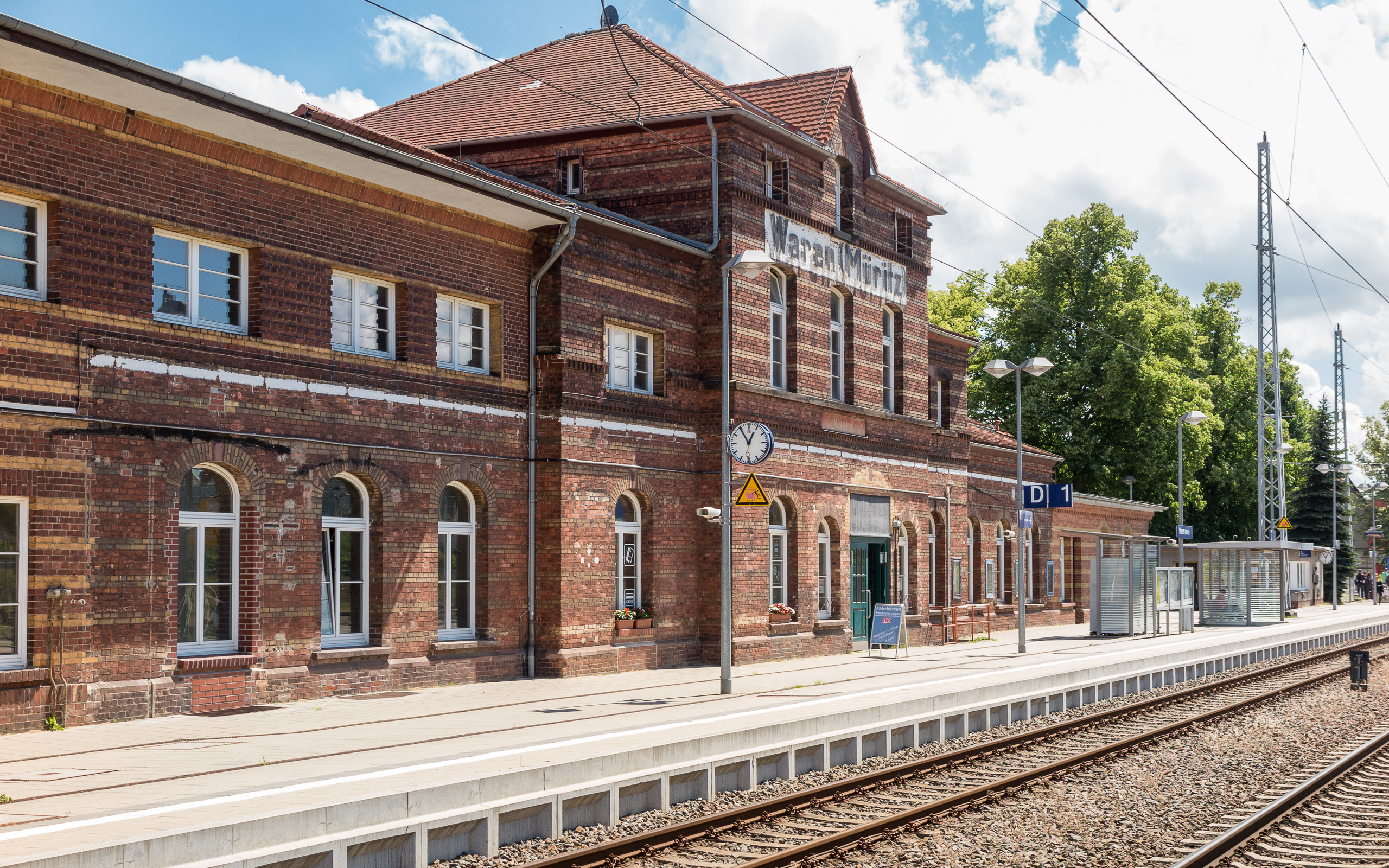 Bahnhof Waren/Müritz